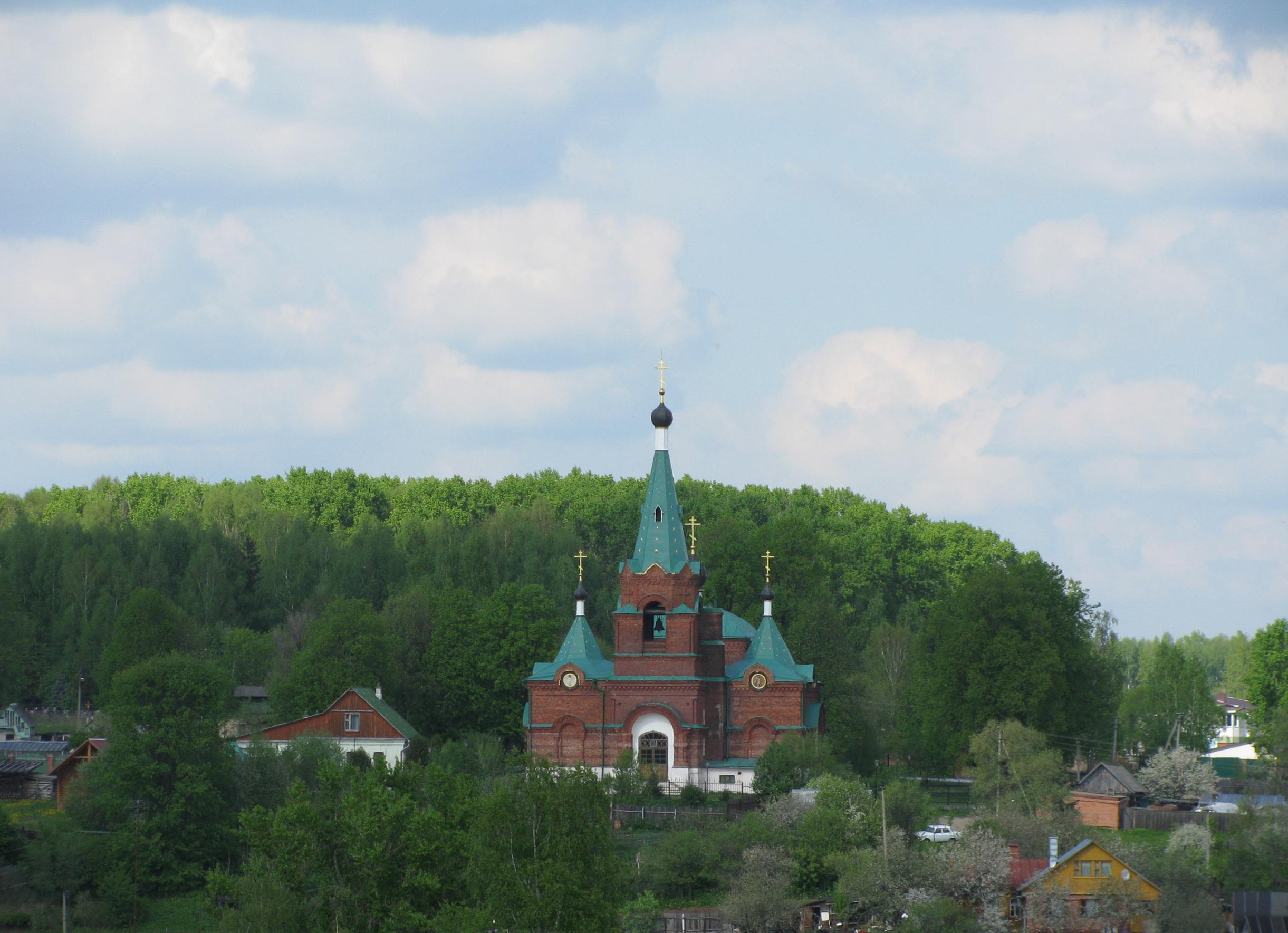 Buturlino village view with St. Nicolas Church (Serpukhov District, Moscow Region)/ Вид на деревню Бутурлино с Церковью Николая Чудотворца (Серпуховский район Московской области)